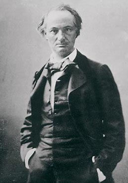 Le poète Charles Baudelaire, par Félix Nadar Félix Nadar (1820-1910); French actress Sarah Bernhardt (1844-1923) in La Tosca (1887)